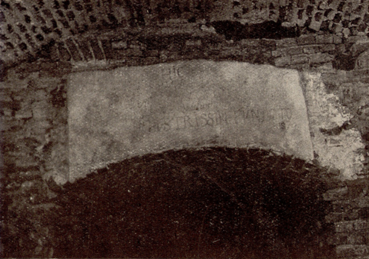 Беларуская (тарашкевіца): Глыбокае (Hłybokaje), надмагільле Язэпа Корсака (Jazep Korsak) у касьцёле кармэлітаў